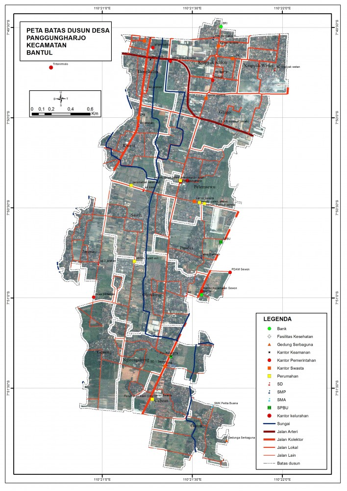 Peta batas wilayah Desa Panggungharjo